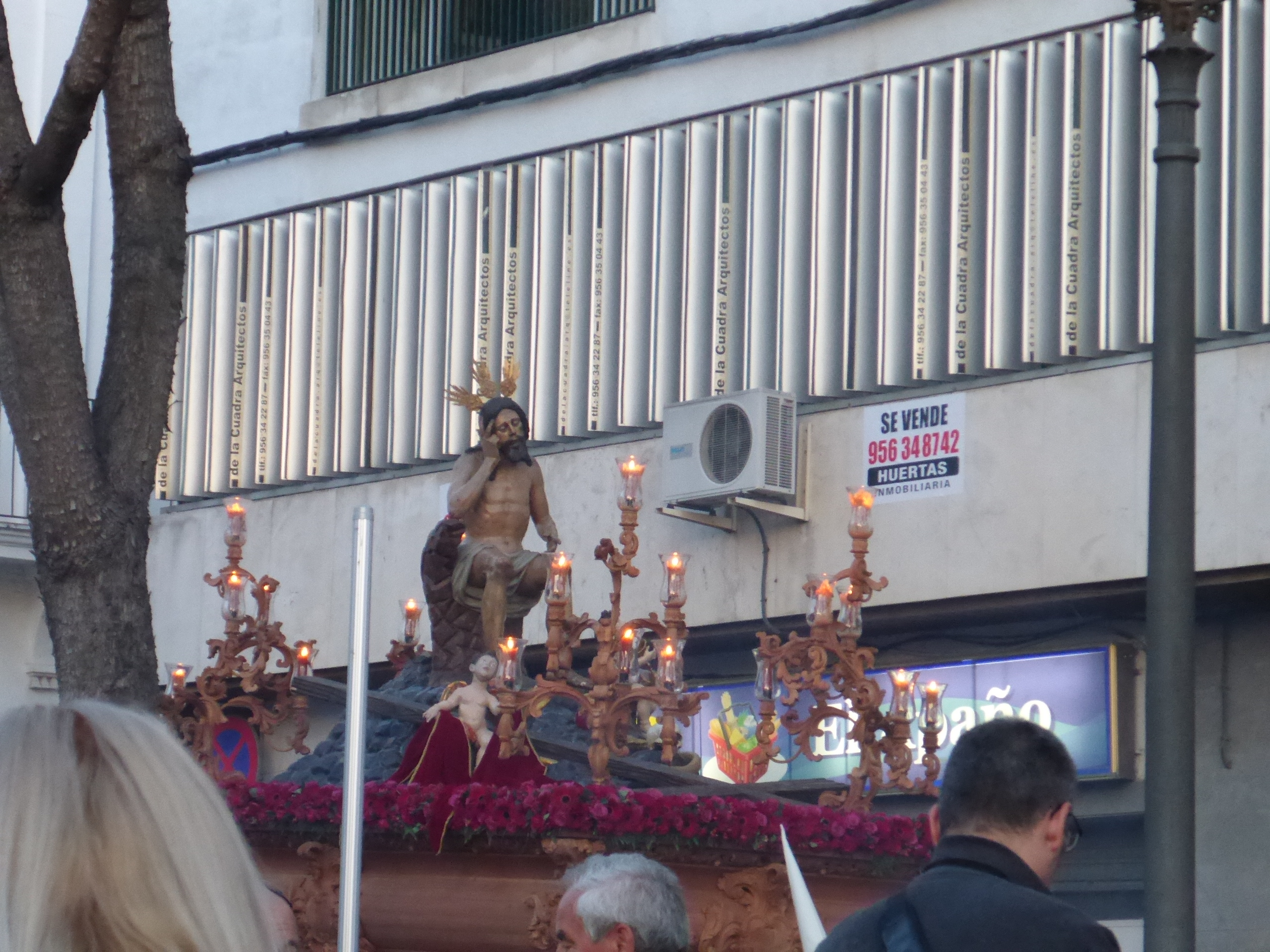 Hermandad de Humildad y Paciencia (Jerez)